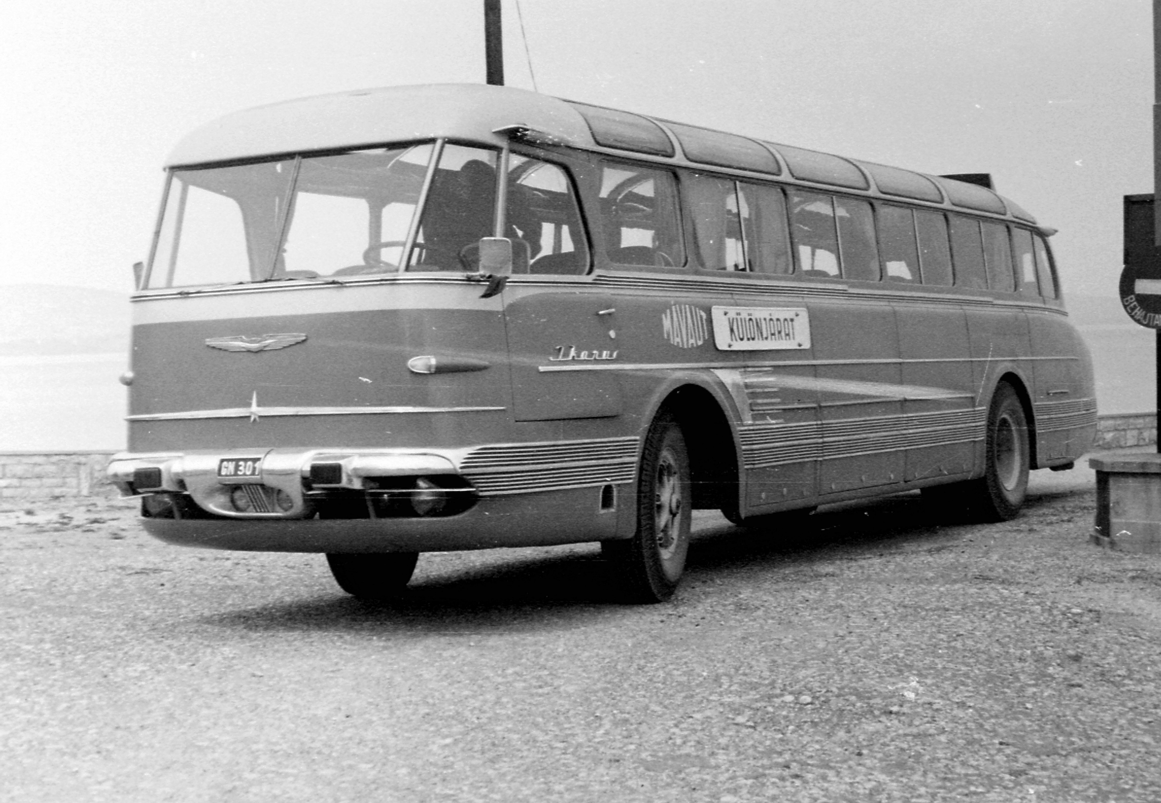 a nullszériás Ikarus 55 típusú távolsági autóbuszok egyike. Location: Hungary Tags: bus, Hungarian brand, number plate Title: a nullszériás Ikarus 55 típusú távolsági autóbuszok egyike.